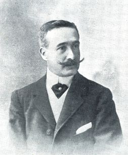 Retrato fotográfico de Tomás Trénor y Palavicino, I Marqués de Túria (Valencia, 1864 - Madrid, 1913)